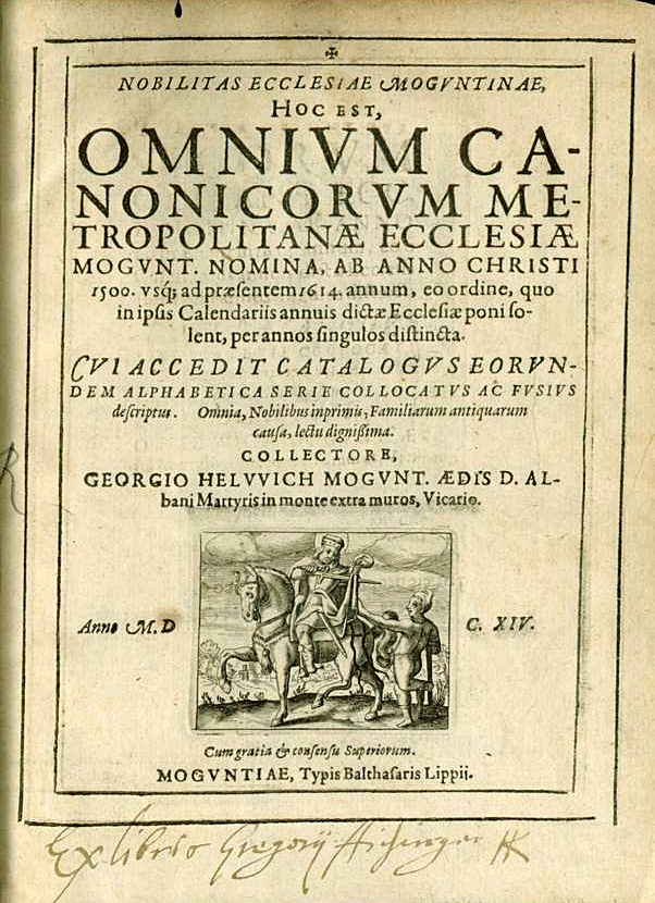 Georg Helwich Mainz, Titelseite von "Nobilitas Ecclesiae Moguntinae", 1614